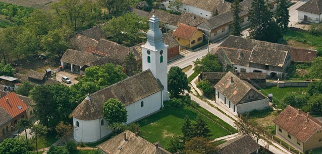 A református templom madártávlatból